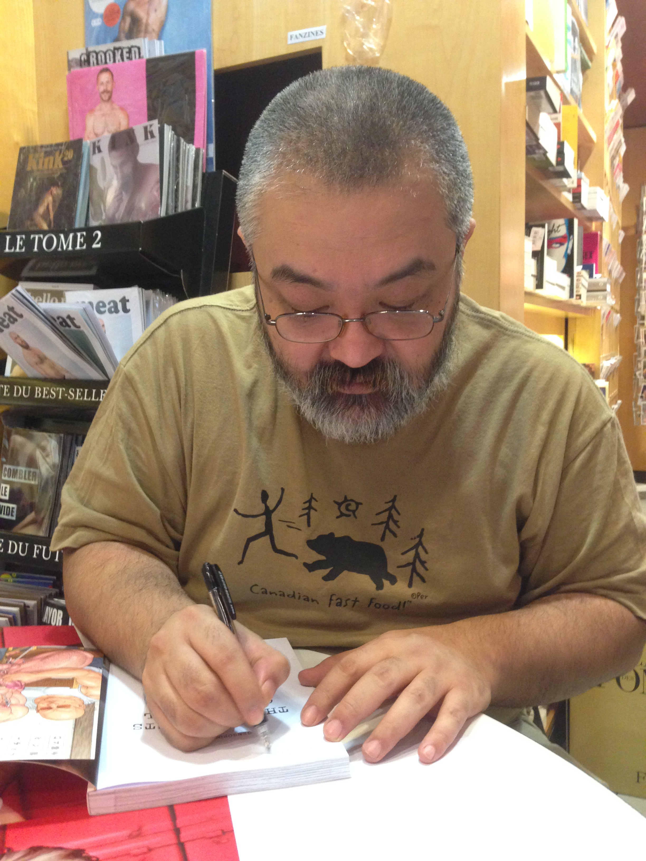 Photo du mangaka Gengoroh Tagame lors de sa séance de dédicace à la librairie "Les Mots à la Bouche", à Paris